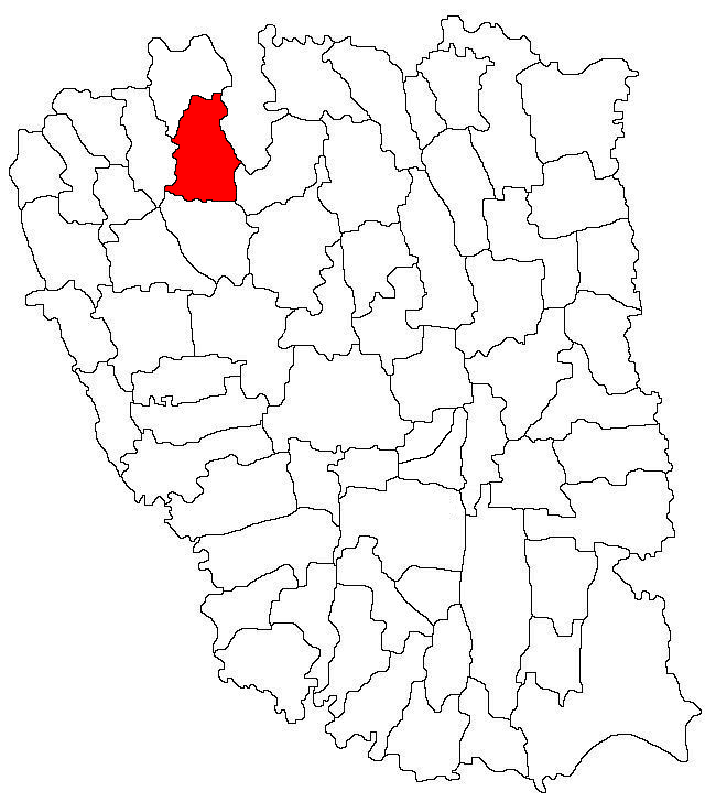 Categorie:Hărţi ale judeţului Galaţi